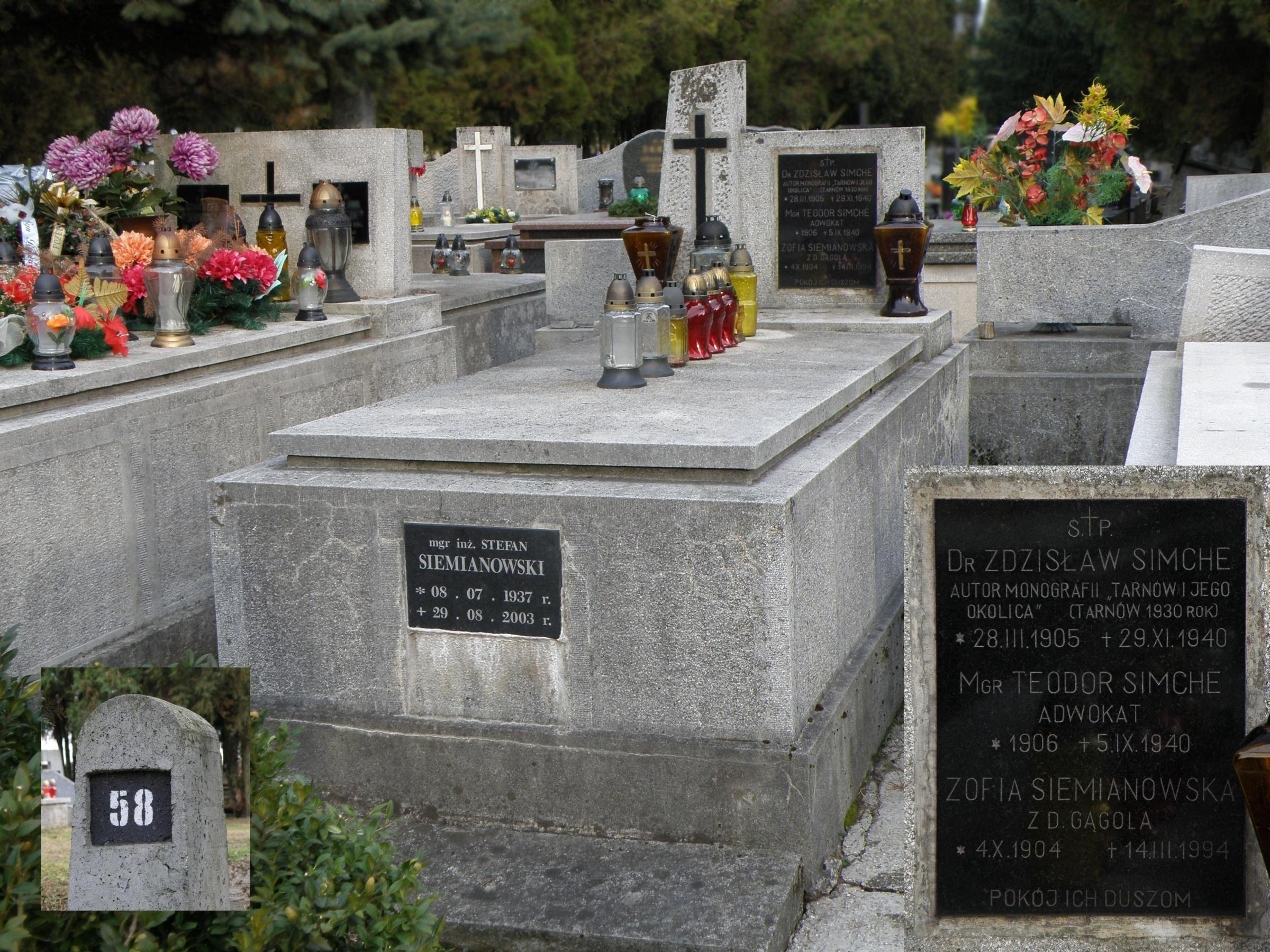 Zdzisław Simche (1905-1940), geograf. Grób rodzinny na cmentarzu komunalnym w Tarnowie-Mościcach (w kwaterze 58).